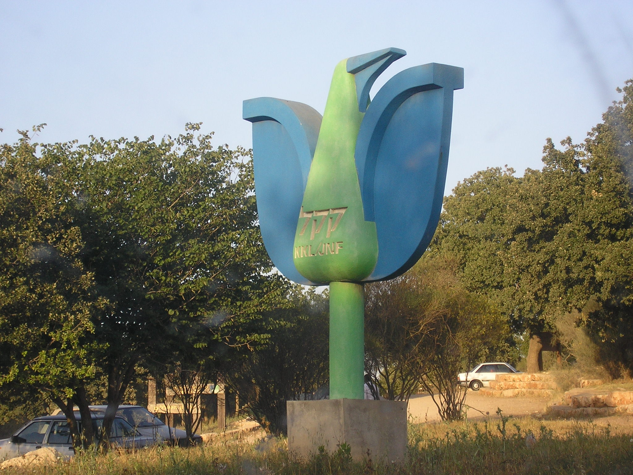 פסל של ציפור, בעיצובו של אליעזר ויסהוף, שהקרן הקיימת מציבה ביערותיה. צולם בסמוך לצומת המוביל.- the Kakal (The Israel National Fund) statue